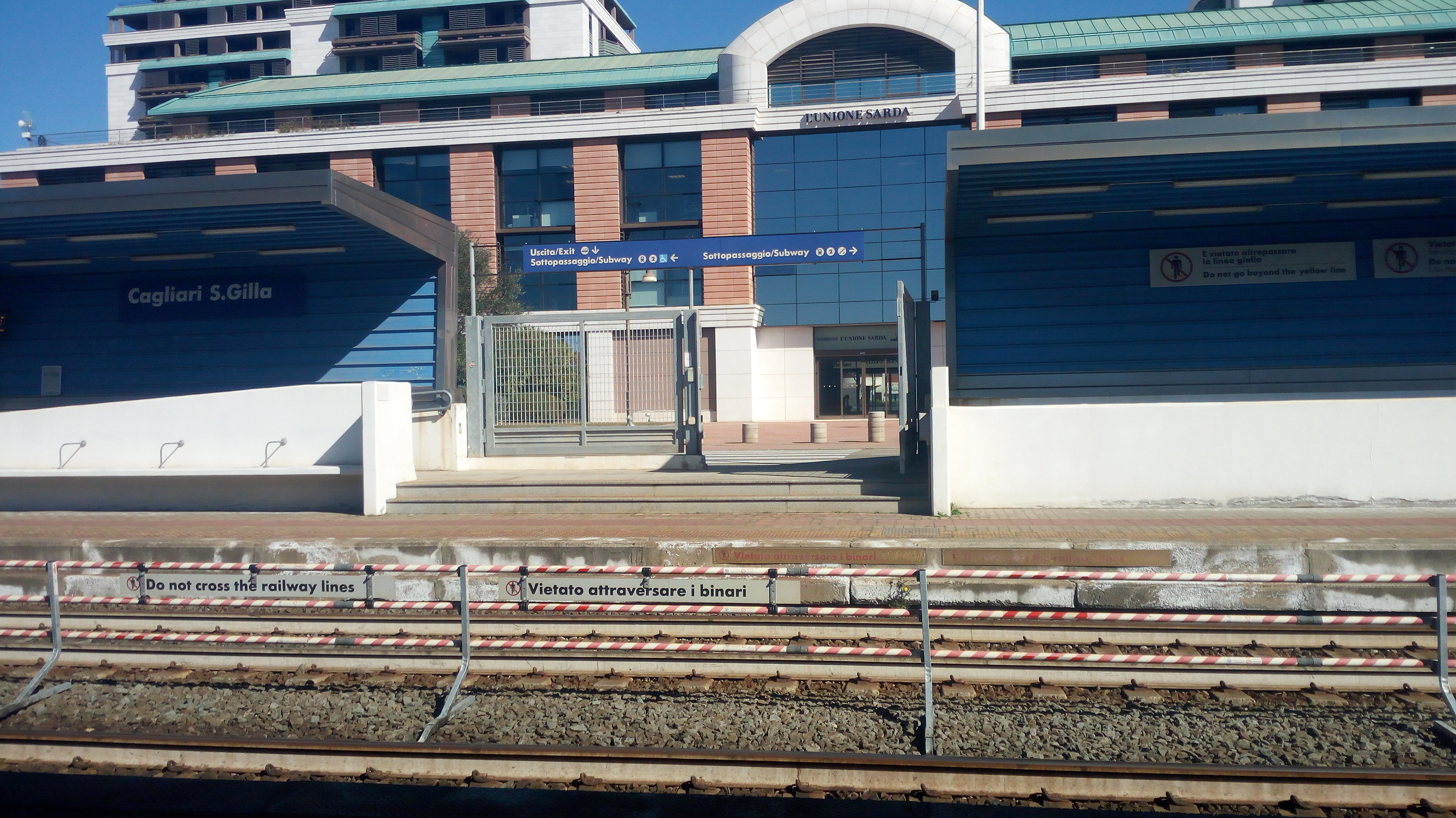 L'ingresso Est della stazione di Cagliari S. Gilla.